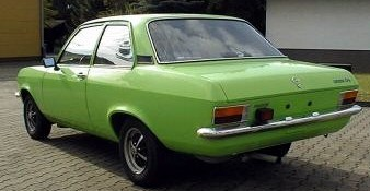 Motiv: Opel Ascona A. Bj. 1974; Kamera: Nikon 885